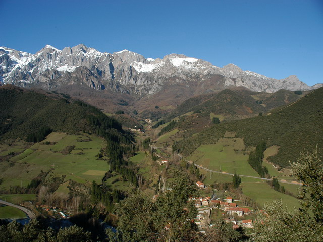 Los Picos de Europa (Turieno en primer plano) © jlgomezlinares